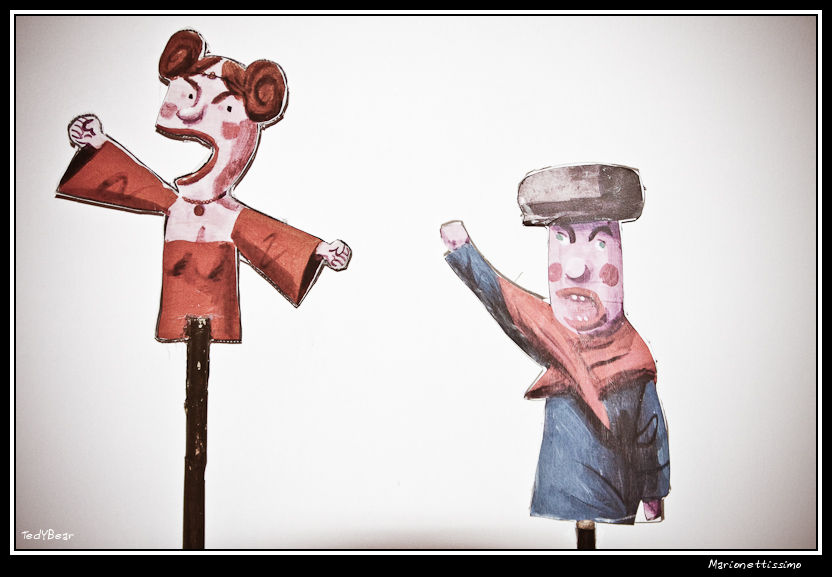 festival marionnettissimo